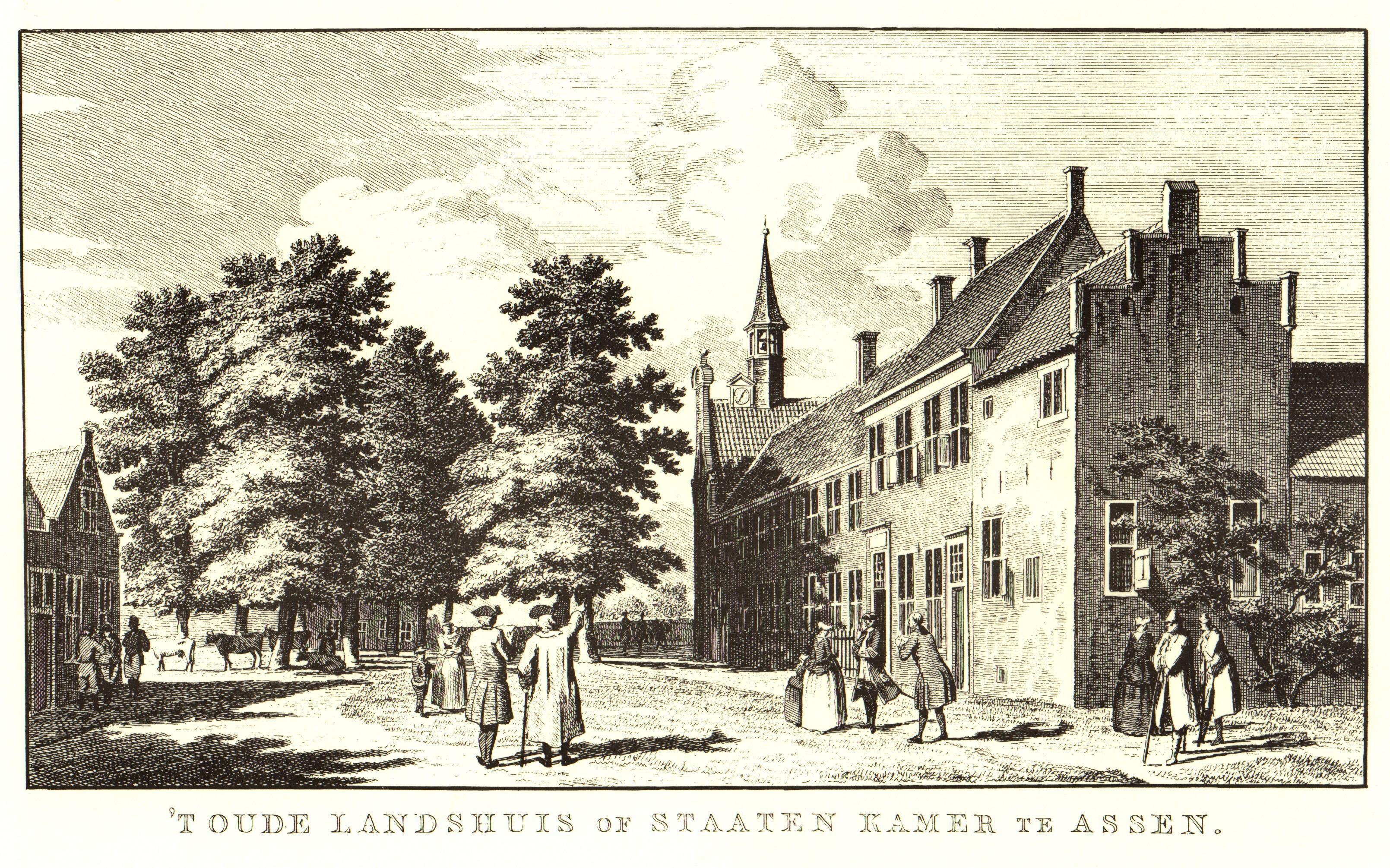 't Oude landshuis of staatenkamer te Assen, naar een tekening van Cornelis Pronk uit 1735.